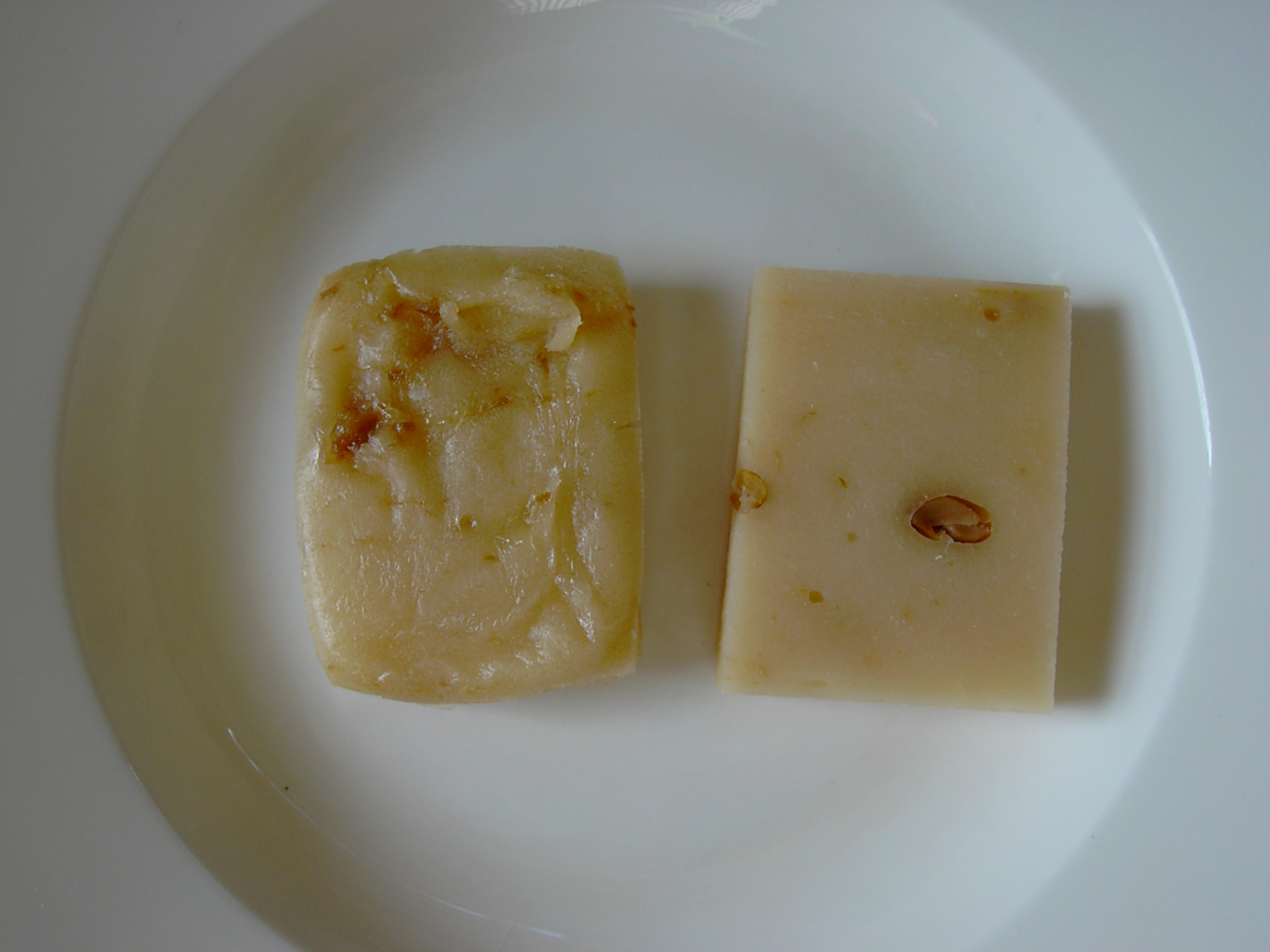 京都市京北町界隈で食されてきた山国納豆を練り込んだ納豆餅（左が焼いたもので右は焼く前の状態） 泊まっていた宿にお願いして用意していただいた